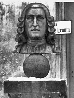 Büste von Anton Josef Klement (1701-1783) - Stifter des Gymnasiums Duppau, Matura 1942 am Gymnasium Duppau